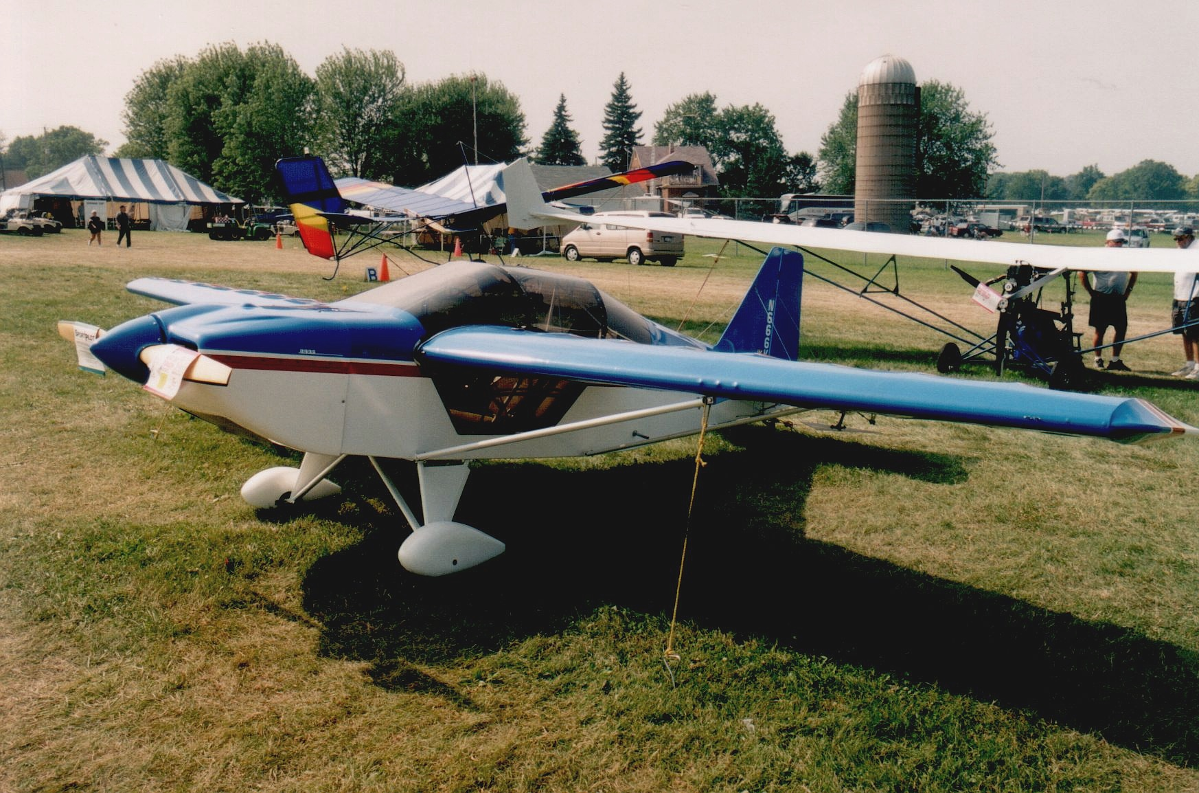 Rans S-10 Sakota at Oshkosh Airventure 2001